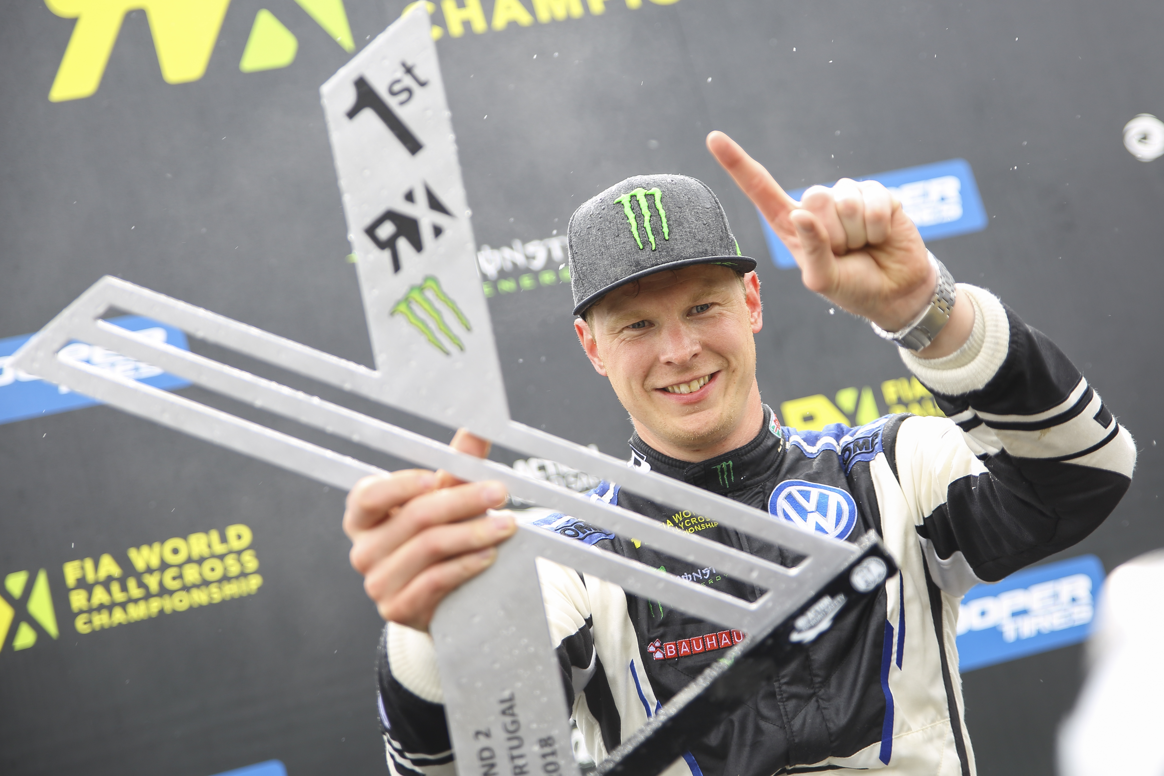 Johan Kristofferssonganó en la final en Portugal, tras hacerlo en España, el Sueco se afianza en el liderato provisional del Campeonato. Sin embargo no fue el mejor en las mangas de entrenamiento que fueron dominadas por Andreas Bakkerud.